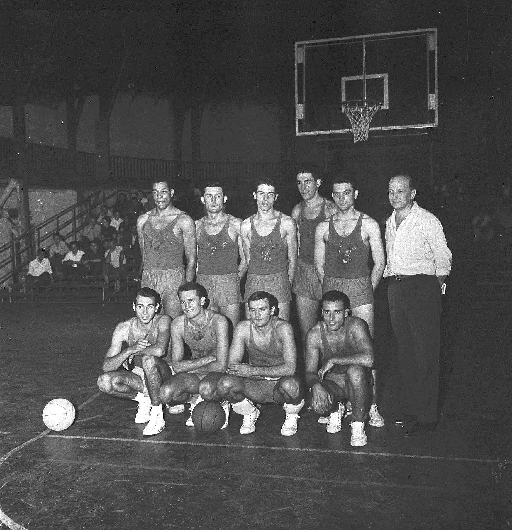 Gymnase municipal le Pré-Catelan (allées Jean-Jaurès). 25 septembre 1961. Photo de groupe de l'équipe de basket du Racing Club Municipal de Toulouse ; en arrière-plan panier de basket et gradins en bois. Observation: A l'origine salle de music-hall, le Pré-Catelan devient un gymnase municipal. Il abrite au rez-de-chausseé le Racing Club Municipal de basket et, à partir de 1959, le 1er étage est occupé par la section escrime du TUC. Il est détruit en 1976.